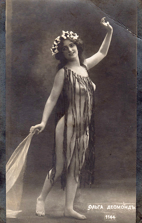 Olga Desmond mientras ejecuta uno de sus bailes (postal vendida por Rusia hacia 1910).